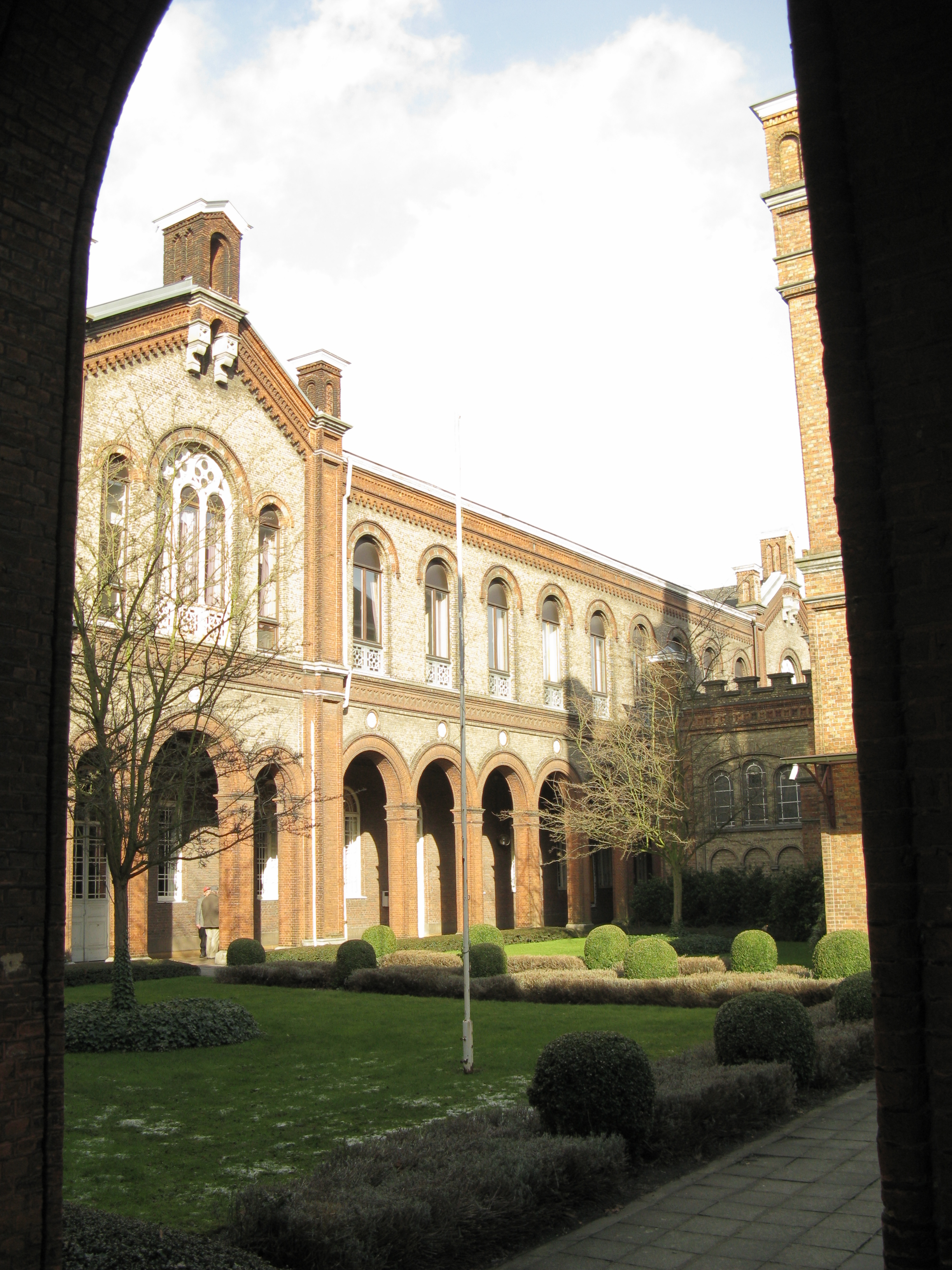 Psychiatrische instelling en museum Dr. Guislain in Gent.